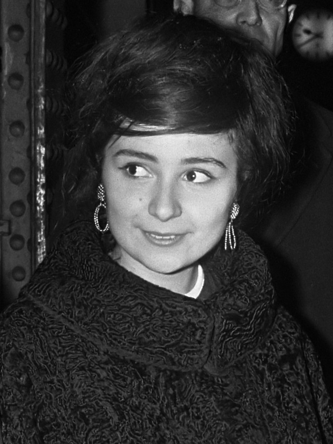 Aankomst Russisch Staatsorkest op CS Amsterdam. Maxim Sjostakowitsj, Liana Isakadze en Jevgenij Svetlanov 24 november 1967